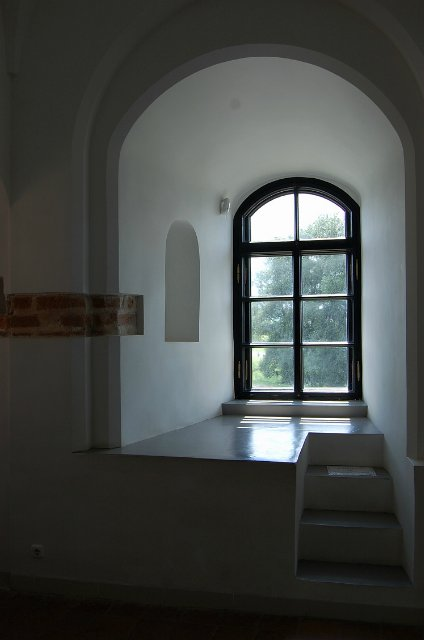 Мірскі замак. Акно